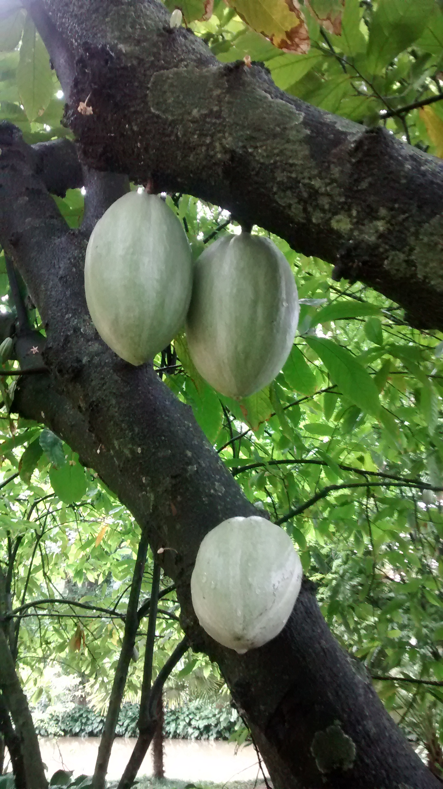 Cacau verde